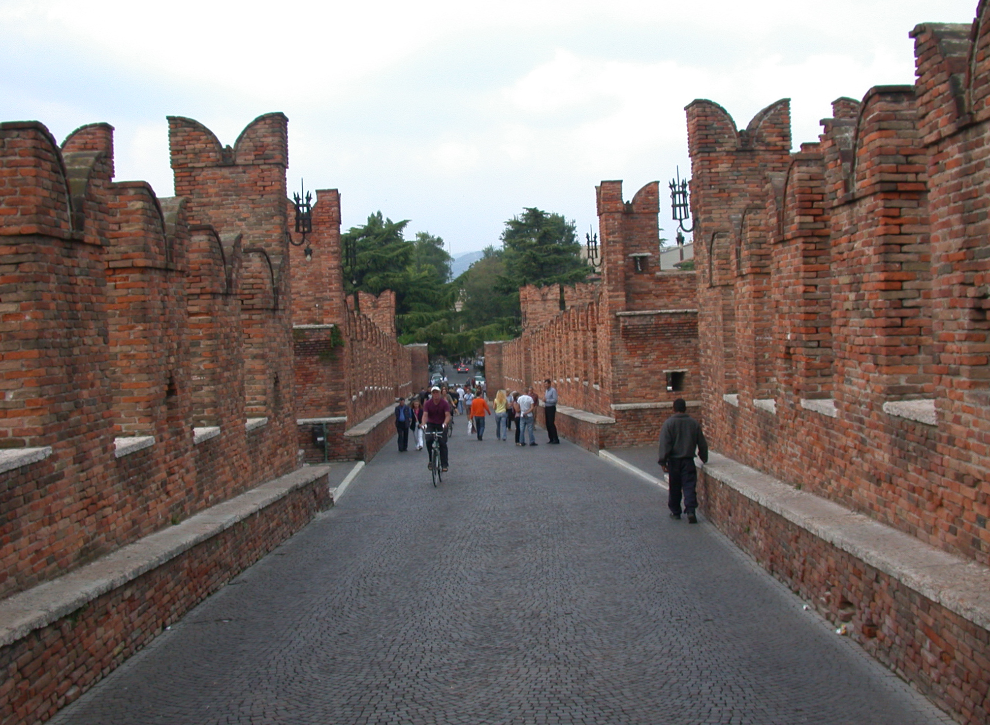 Verona, bridge "Ponte Scaligero"